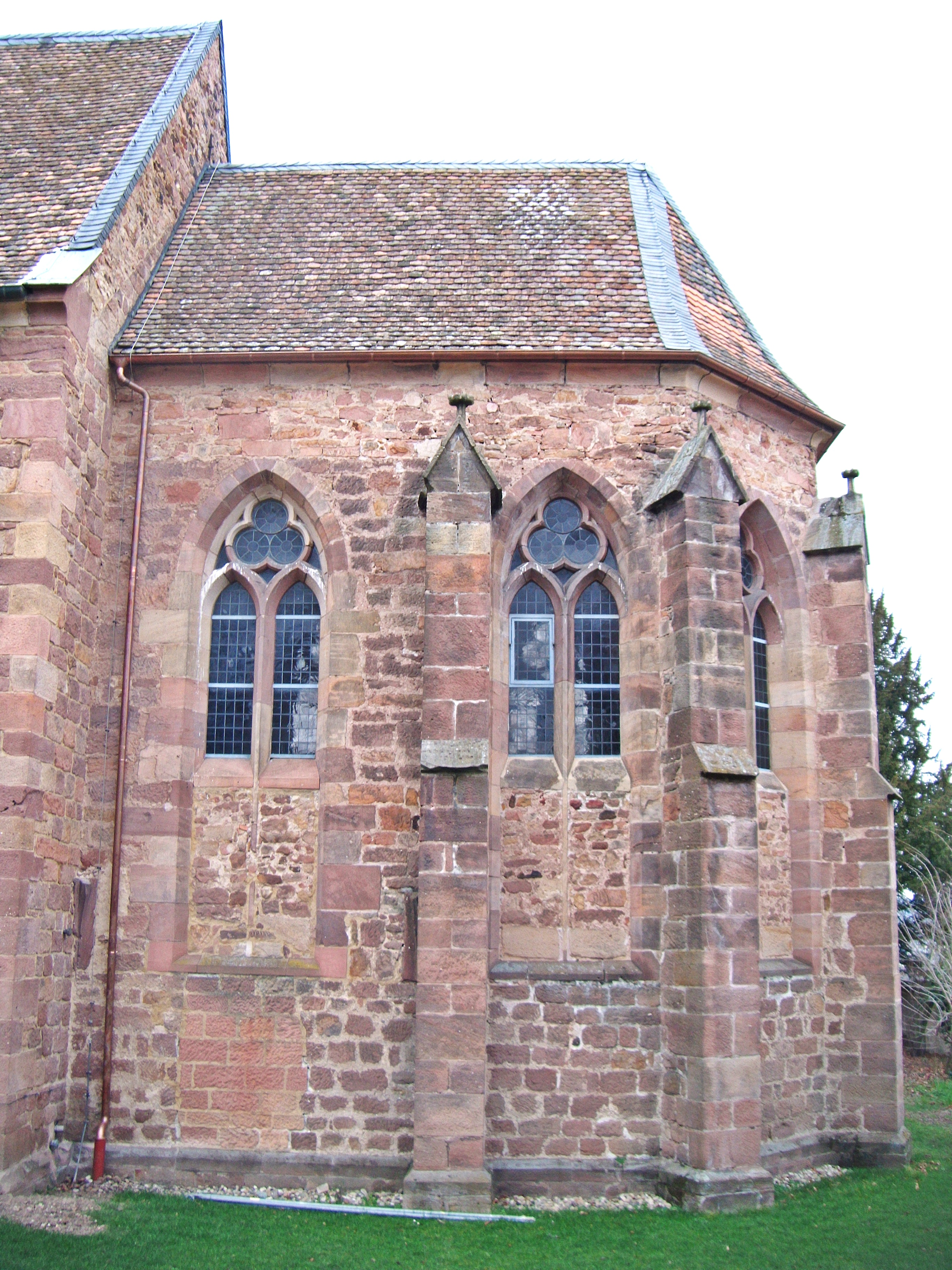 Weisenheim am Berg, Chor der Protestantischen Kirche von Süden